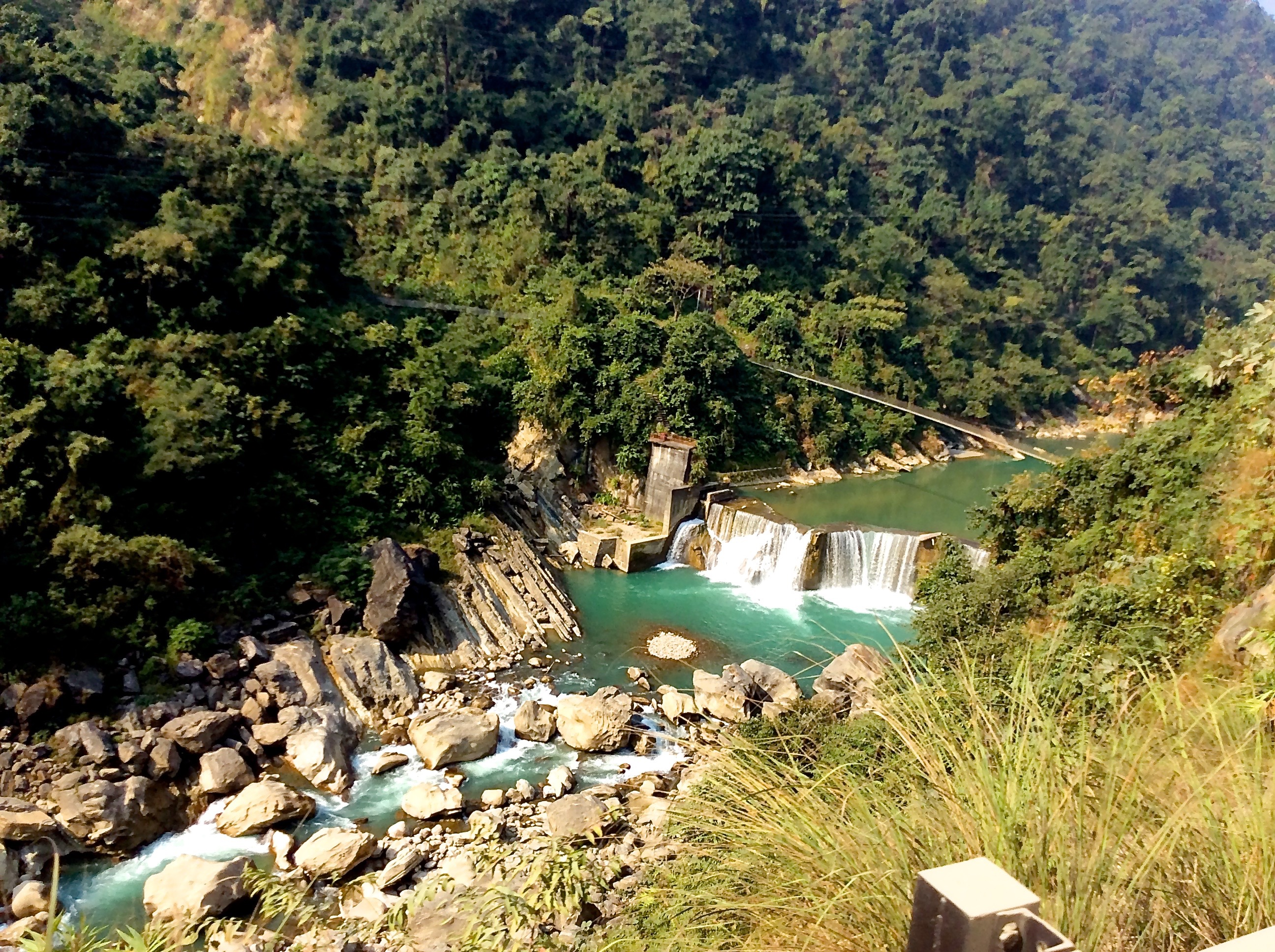 तिनाउ नदी, यो नदी पाल्पा हुँदै रुपन्देही जिल्लामा आएको छ। यसको किनारा मा सिद्द बाबा धाम छ जहाँ भक्तालुजन हरु पूजा आजा गर्न जान्छन। अनि यसको किनार मा बुटवल बजार छ। बुटवल भल्बारी भैरहवा हुँदै यो नदी नेपाल को सिमाना देखि बाहिरिएको छ। अन्तत यो नदि भारत को उत्तर प्रदेश मा गएको छ।